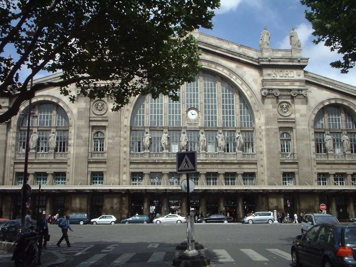 Photo libre de droits de la Gare du Nord à Paris. Sujet : Gare du Nord à Paris Auteur de la prise de vue : Pol